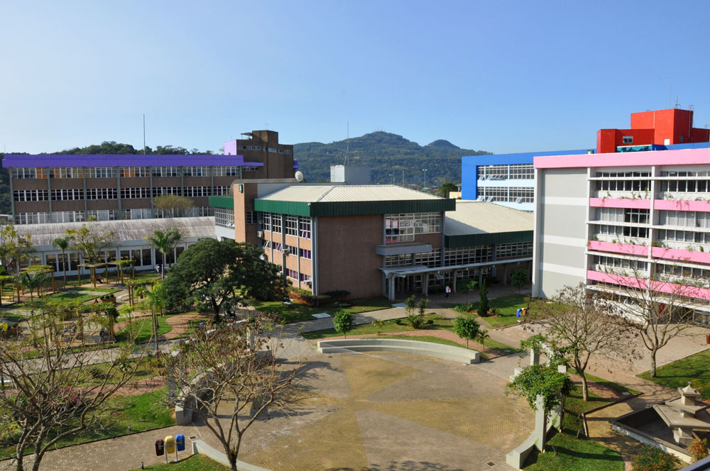 Foto do Câmpus II da universidade tirada do prédio da biblioteca.